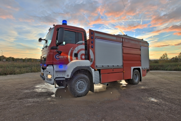 Den ULF 1 1